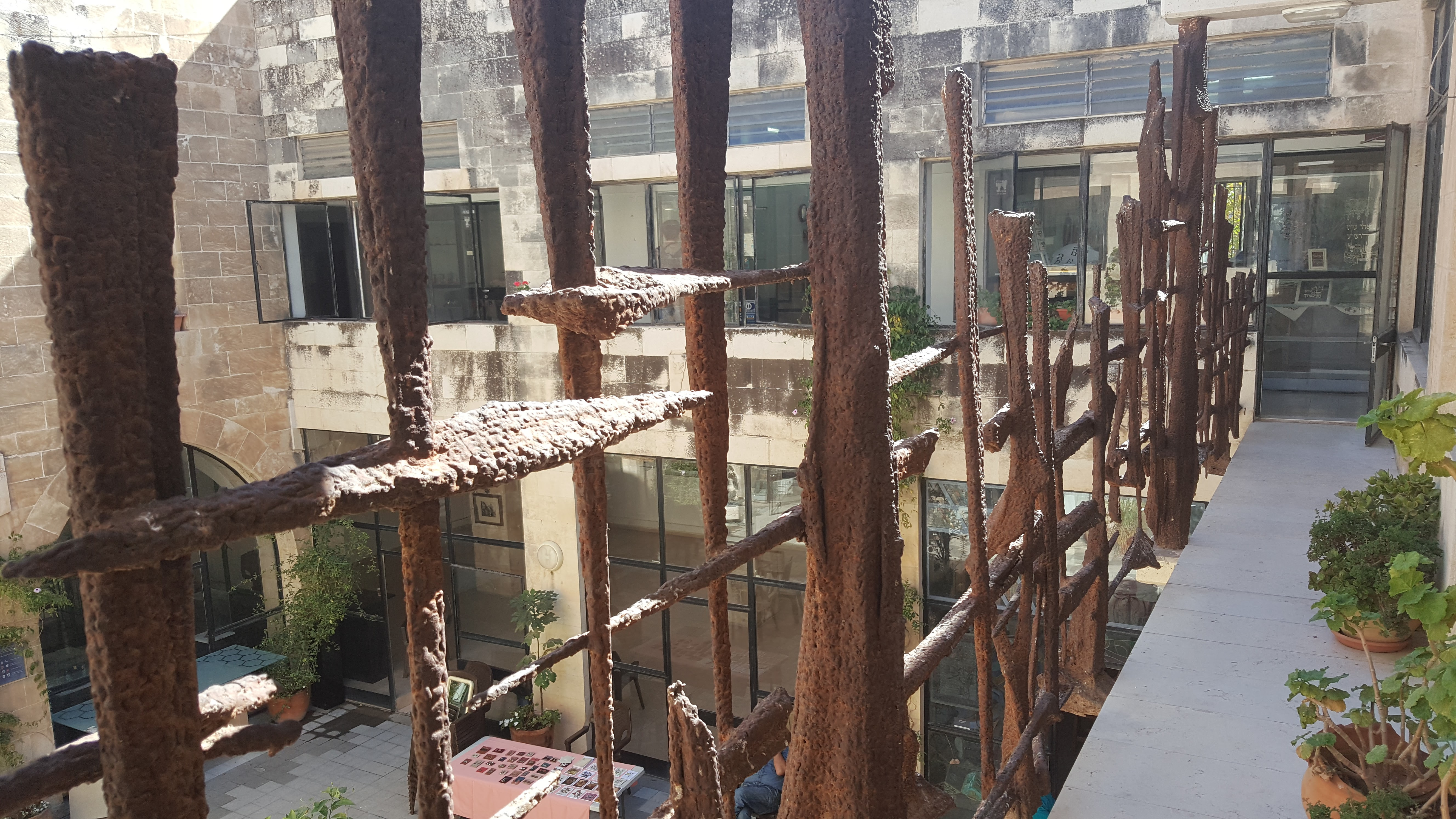 מעקה של הפסל דוד פלומבו בבית אות המוצר הירושלמי